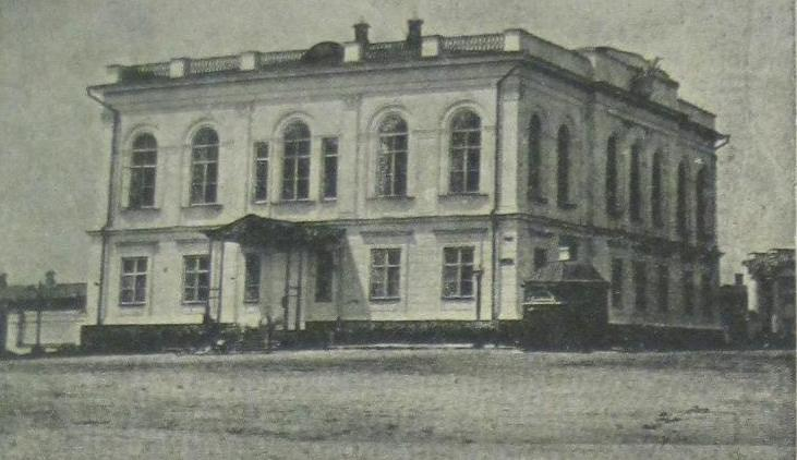 Новочеркасск (до 07.11.1917). Дом (здание) Дворянского собрания.